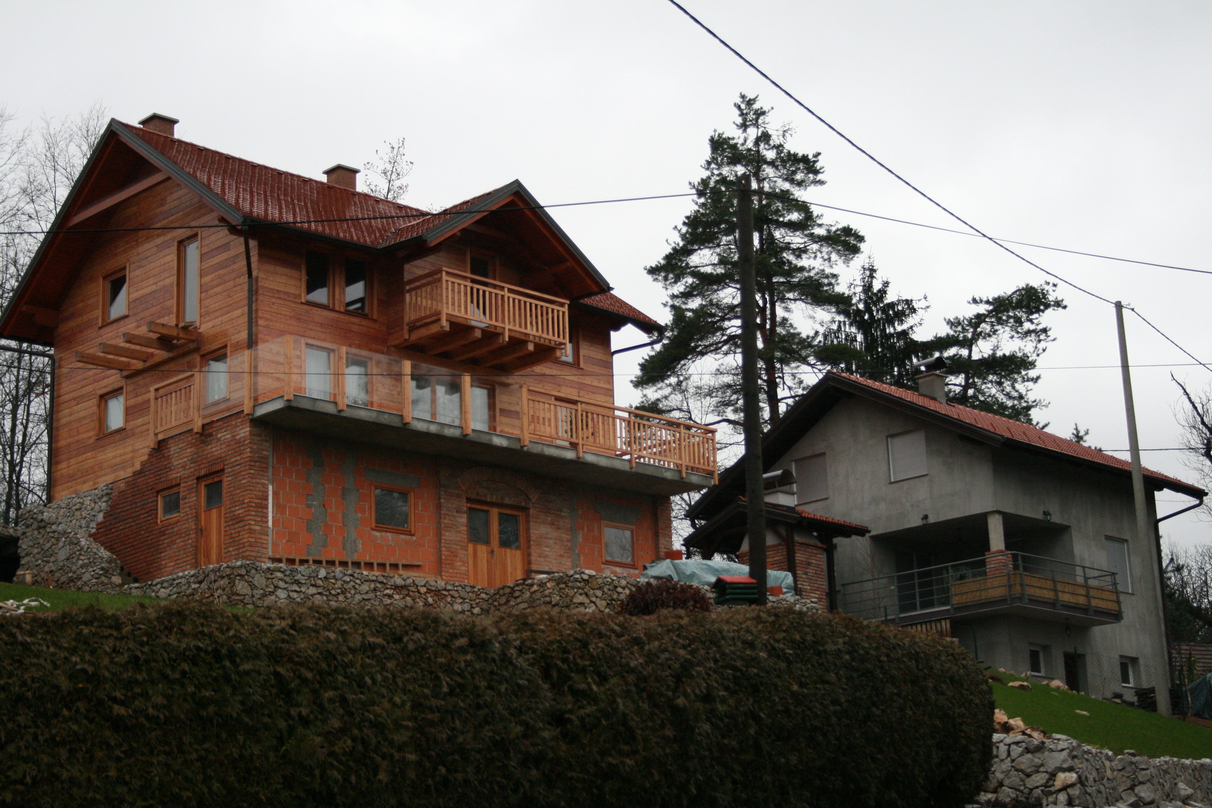 Katici vikend naselje 2014.